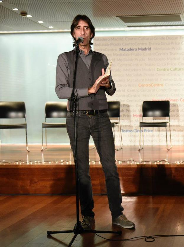 El Pabellón de los Jardines de Cecilio Rodríguez, en el Parque de El Retiro, ha sido el escenario para la presentación de las nuevas direcciones de seis grandes centros culturales municipales. La alcaldesa de Madrid, Manuela Carmena, les ha dado la bienvenida a la ciudad. La música del productor y músico Suso Saiz, y las palabras del novelista y poeta Benjamín Prado, les han acompañado en este encuentro.